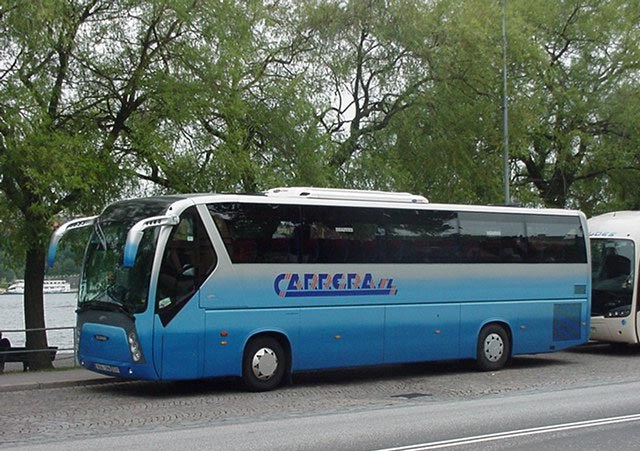 Hispano Divo coach